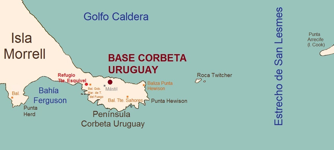 Península Corbeta Uruguay de la Isla Thule/Morrell con la base Corbeta Uruguay y los principales sitios de los alrededores.